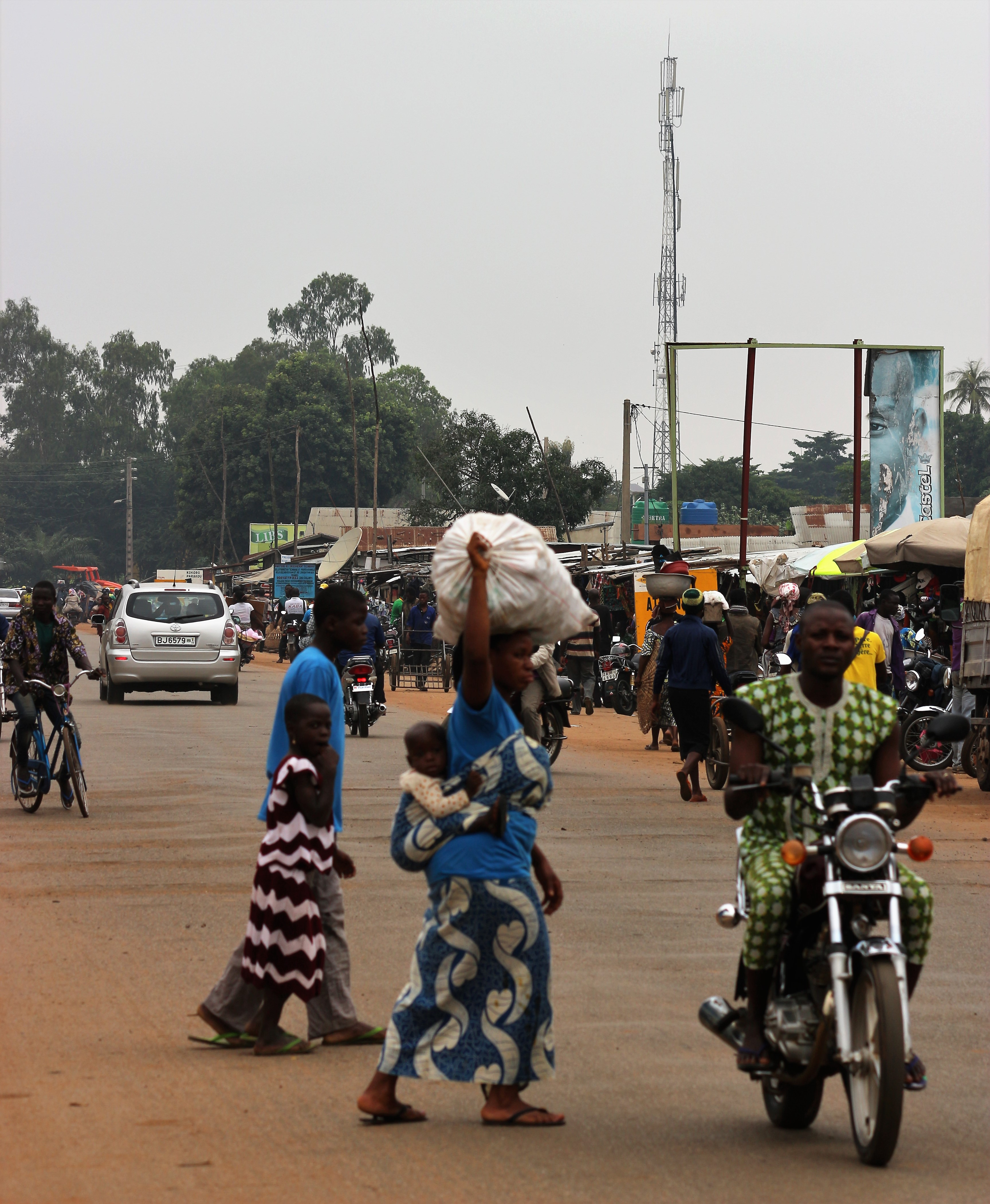 En zem, sur la tête...tout se transporte This is an image of "African people at work" from Benin